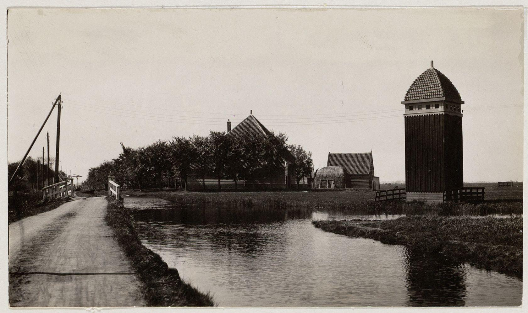 Beschrijving Ransdorp Bloemendalergouw (13) in westelijke richting gezien naar ophaalbrug met brug 310 (76P) Documenttype foto Vervaardiger Eck, J. van (Jacobus, 1873-1946) Collectie Collectie J. van Eck: foto's Datering 1922 Geografische naam Ransdorp Bloemendalergouw Inventarissen Afbeeldingsbestand A01634000247 Generated with Dememorixer